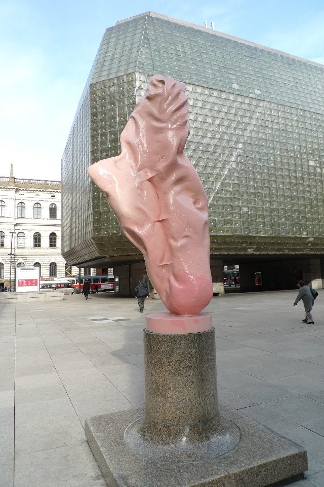 Pavel Karous: „Žvýkačka“ („Kaugummi“) - „Art meets the (P.R.A.H.A) streets“ - Standort: vor der „Neuen Szene“ („Nová scéna“) in Prag